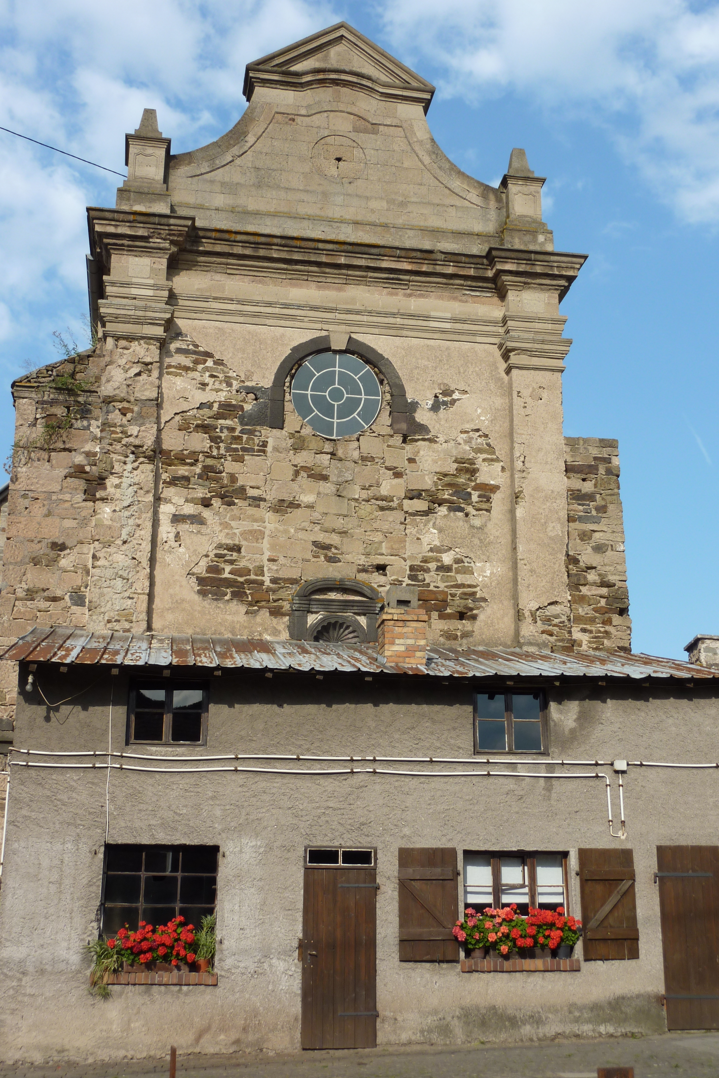 Propstei Buchholz, Westfassade der Kirche Sankt Servatius